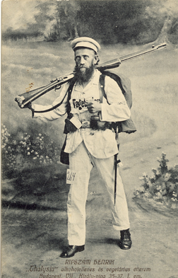 Negyvenötéves koromban, orvosi tanácsra, kezdtem sportolni. Azóta antialkoholista és vegetáriánus vagyok. Legszebb sikereimet Drezdában értem el 1913-ban, a hygiénikus kiállítás alkalmával rendezett nemzetközi katonai fölszerelés futóversenyben. 360 induló közül, 22 kilogrammos terheléssel, 30 kilométeren át, 82. lettem, de kondicióban (amelyet orvosok állapítottak meg) a 6. helyezést értem el.